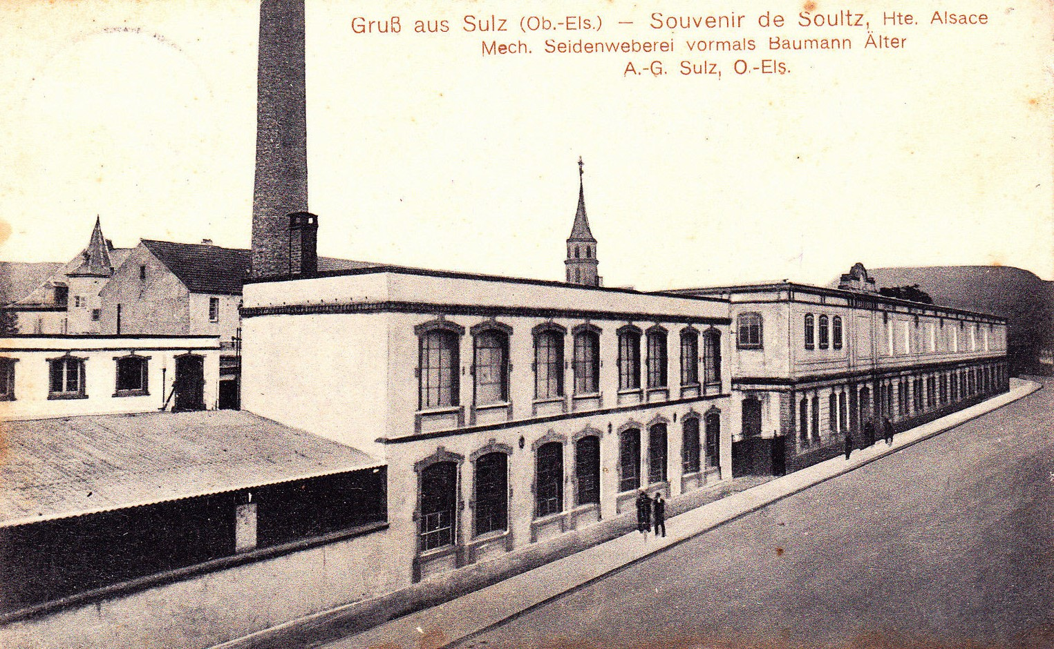 Seidenweberei Baumann älter, Soultz-Haut-Rhin/Sulz, Oberelsass, Frankreich, 1915